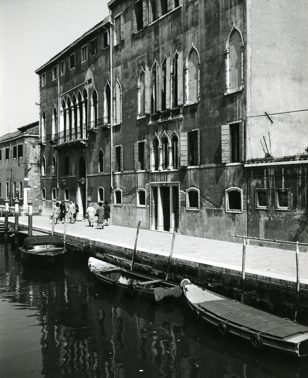 Servizio fotografico : Venezia, 1968 / Paolo Monti. - Stampe: 5 : Positivo b/n, gelatina bromuro d'argento/ carta, 18x24. - ((Al verso delle stampe manoscritti i numeri dei negativi corrispondenti (formato 35 mm) con indicazione del fotogramma: 7/3, 506/64, 520/45, 528/58; iscrizioni didascaliche manoscritte a matita; timbro a inchiostro con copyright: "© - Credit to:/ Paolo Monti/ Via T. Tasso [...]/ Milano [...]". - Sul coperchio della scatola iscrizione didascalica manoscritta a pennarello nero: "Venezia". - Occasione: Documentazione per la pubblicazione: Arslan Edoardo, "Venezia gotica: architettura civile gotica veneziana", Milano, Electa, 1970. - Fonte: Monografia di Arslan, Edoardo: Venezia gotica: architettura civile gotica veneziana, Milano, Electa (1970)